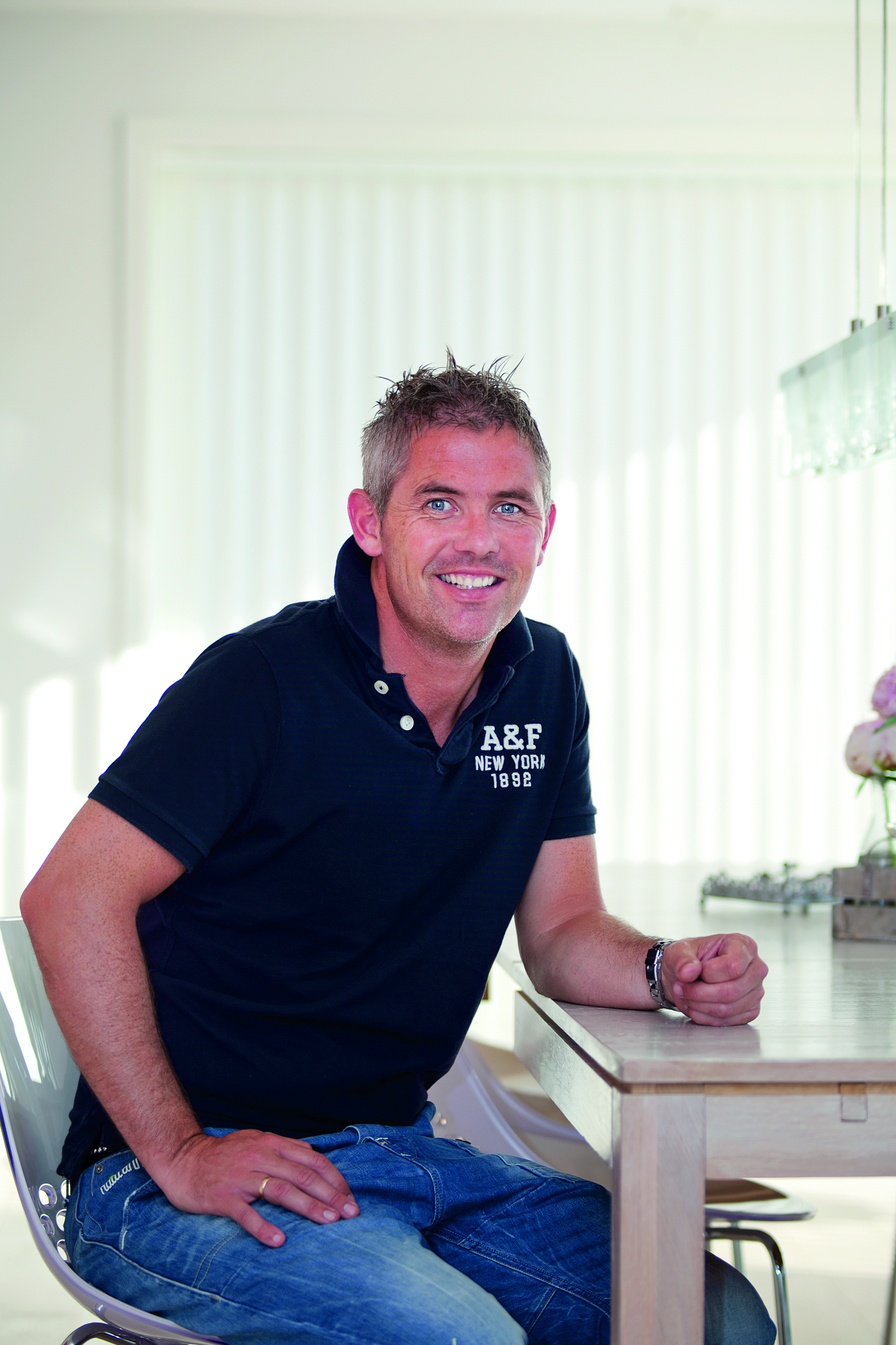 Pastor i pinsebevegelsen, Knut Idland